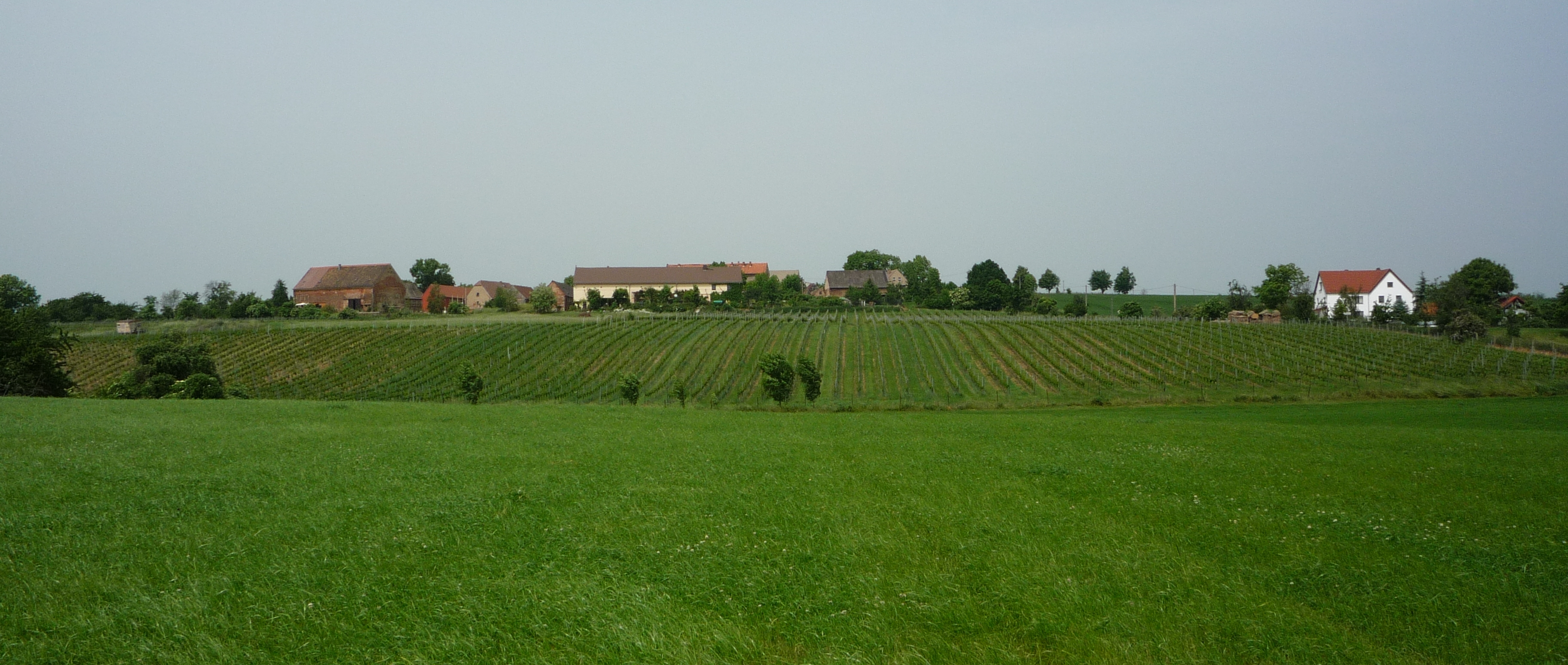 Blick auf den Ortsteil Rottewitz der Stadt Meißen